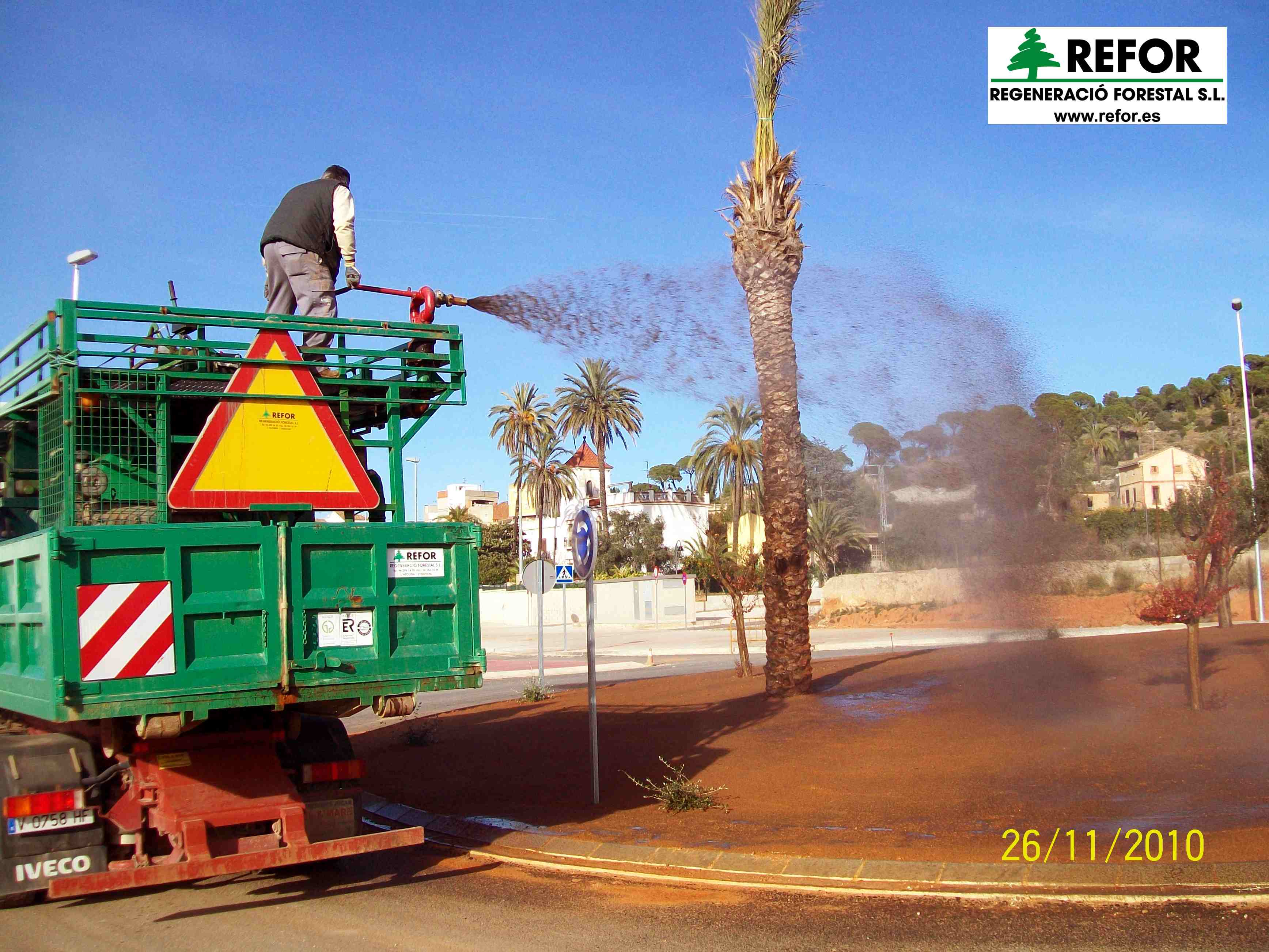 Siembra de Césped en Jardines mediante la técnica de Hidrosiembra.